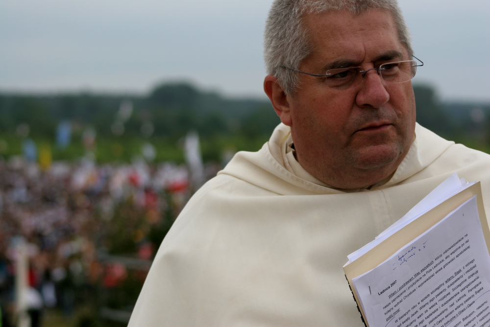 Ojciec Jan Góra na tel pól Lednickich